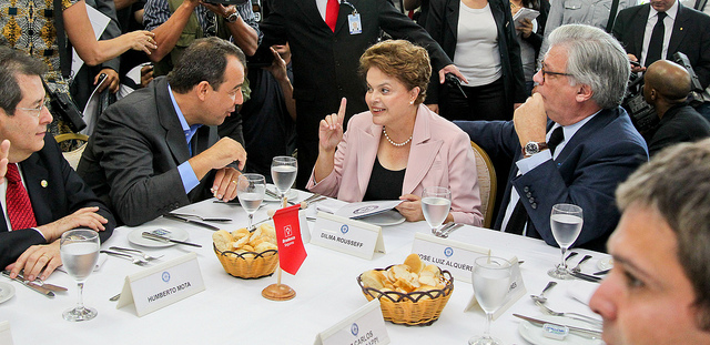 16/09/2010. A candidata Dilma Rousseff (PT) esteve em encontro com empresários na Associação Comercial do Rio de Janeiro - ACRJ. (Foto: Roberto Stuckert Filho.) Notícias sobre política, economia, internacional, cidadania, entre outros assuntos. Acompanhe diariamente a Rede Brasil Atual